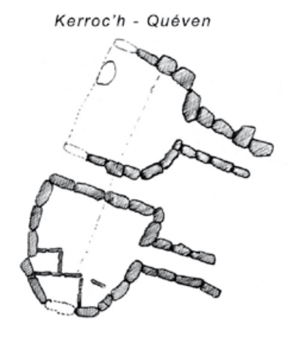 Plan du tumulus de Kerroc’h, réalisé par le Commandant Le Pontois suite à la fouille de 1904.